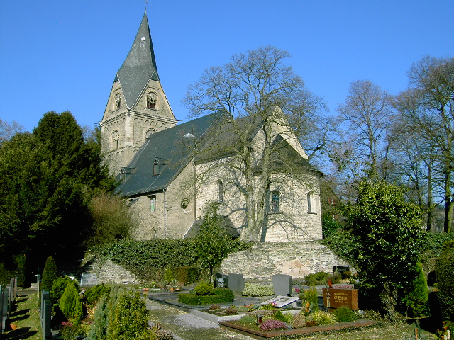 Feldkirche (von Südosten)